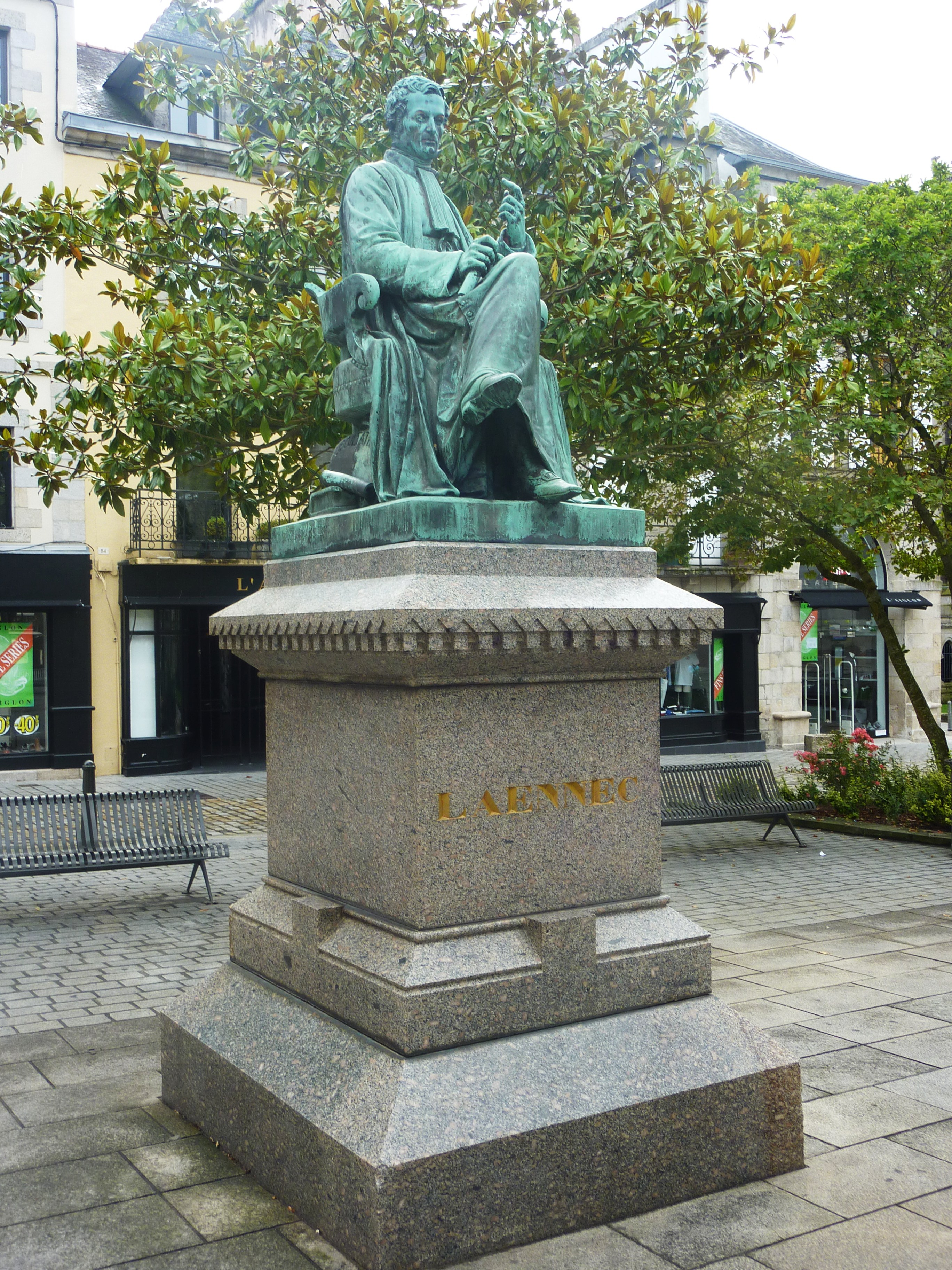 Quimper : statue de Laënnec près de la cathédrale